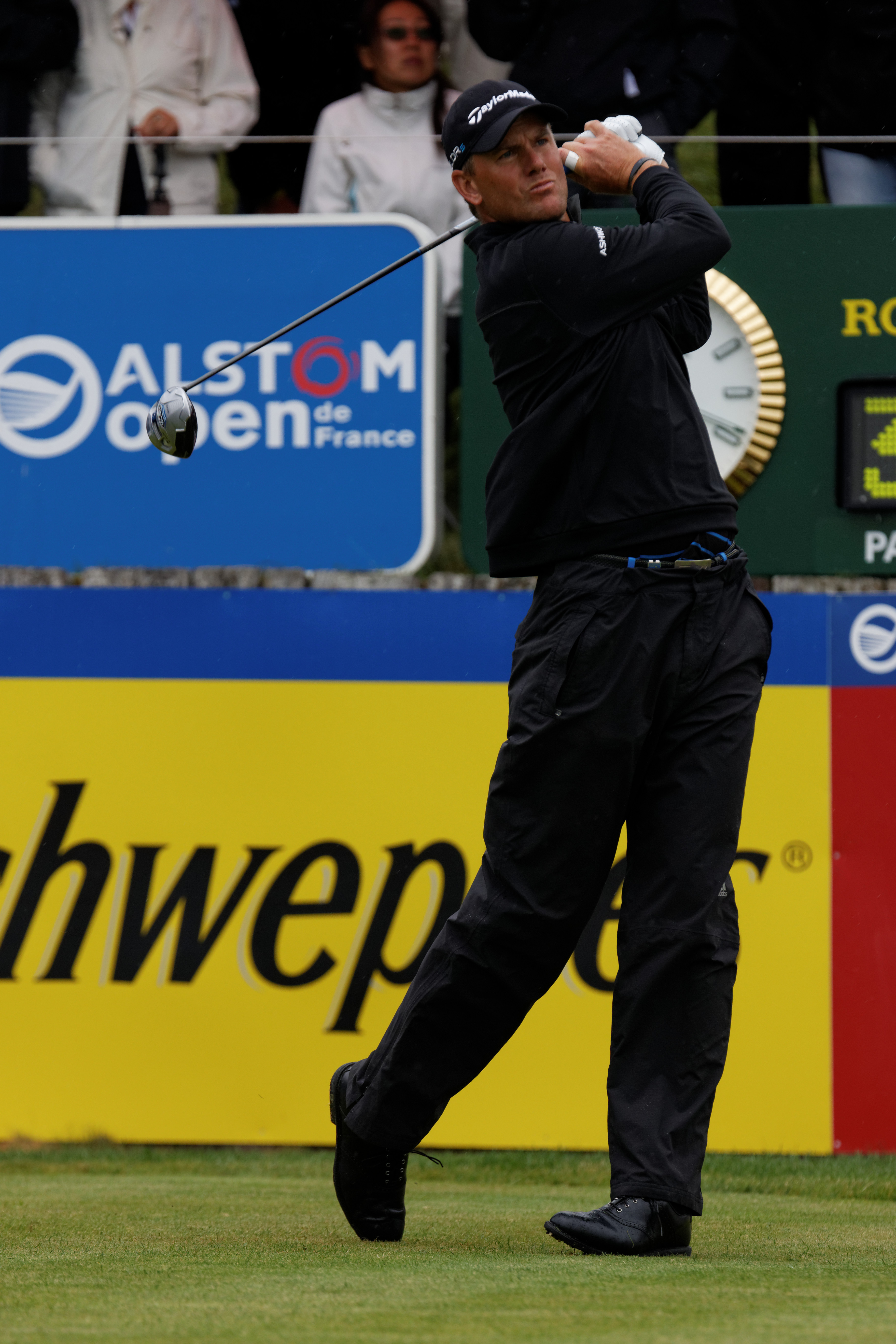 Robert Karlsson lors du quatrième tour de l'Open de France 2014 - Golf National - Saint-Quentin-en-Yvelines (78) - départ du trou n° 1